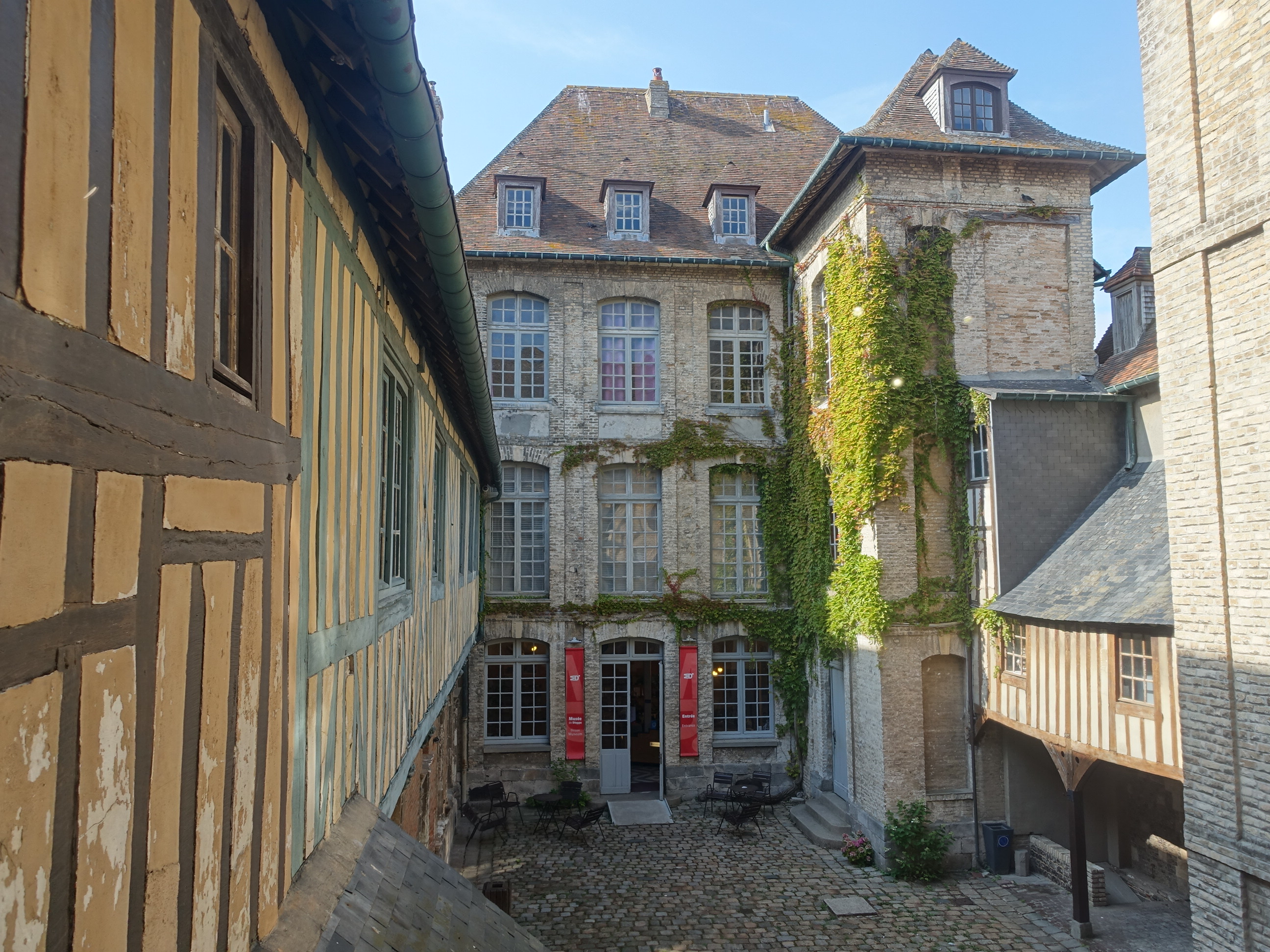 Innerer Innenhof der Burg Dieppe